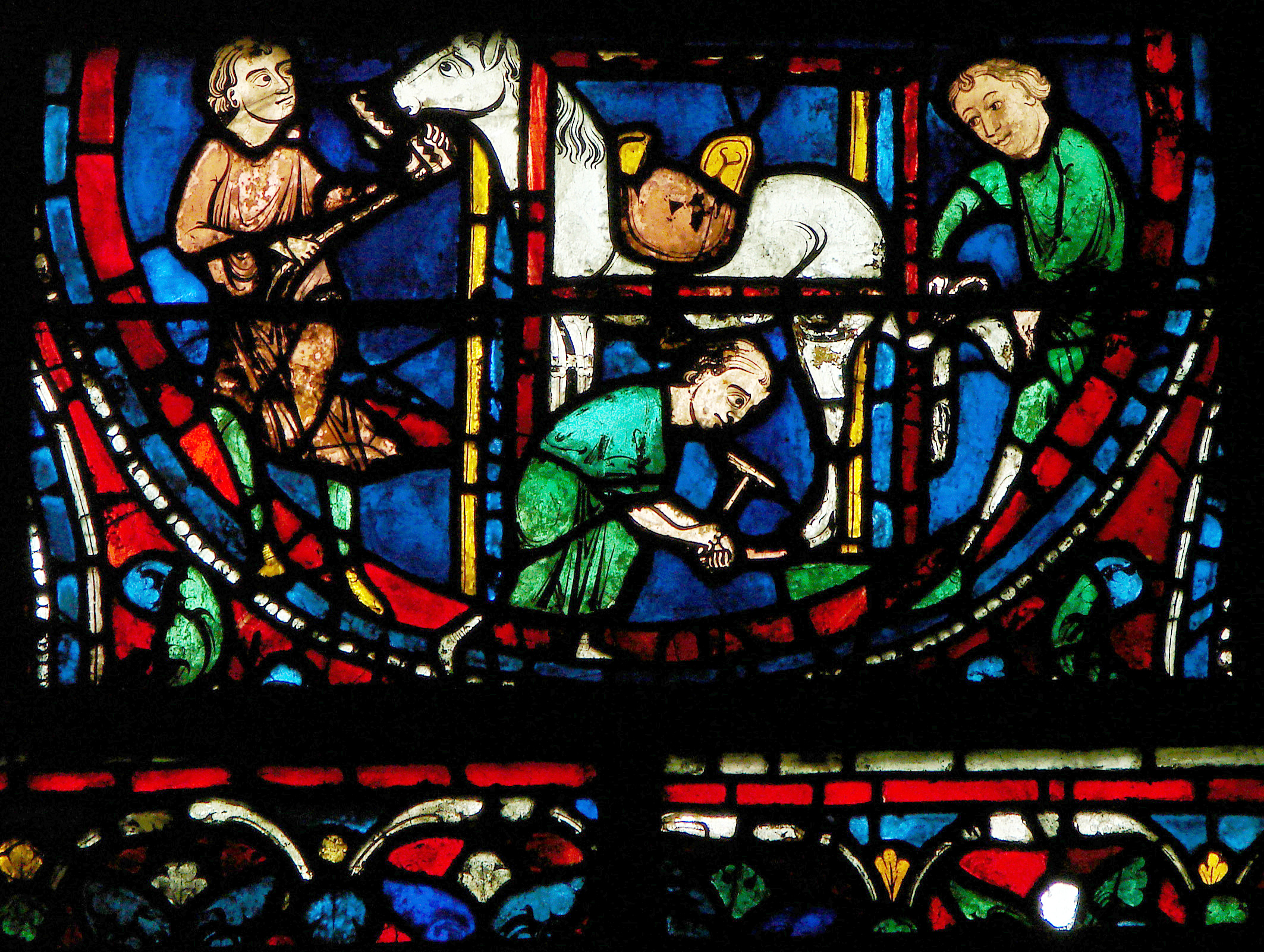 Détail d'un vitrail de la cathédrale Notre-Dame de Chartres: un maréchal-ferrant.